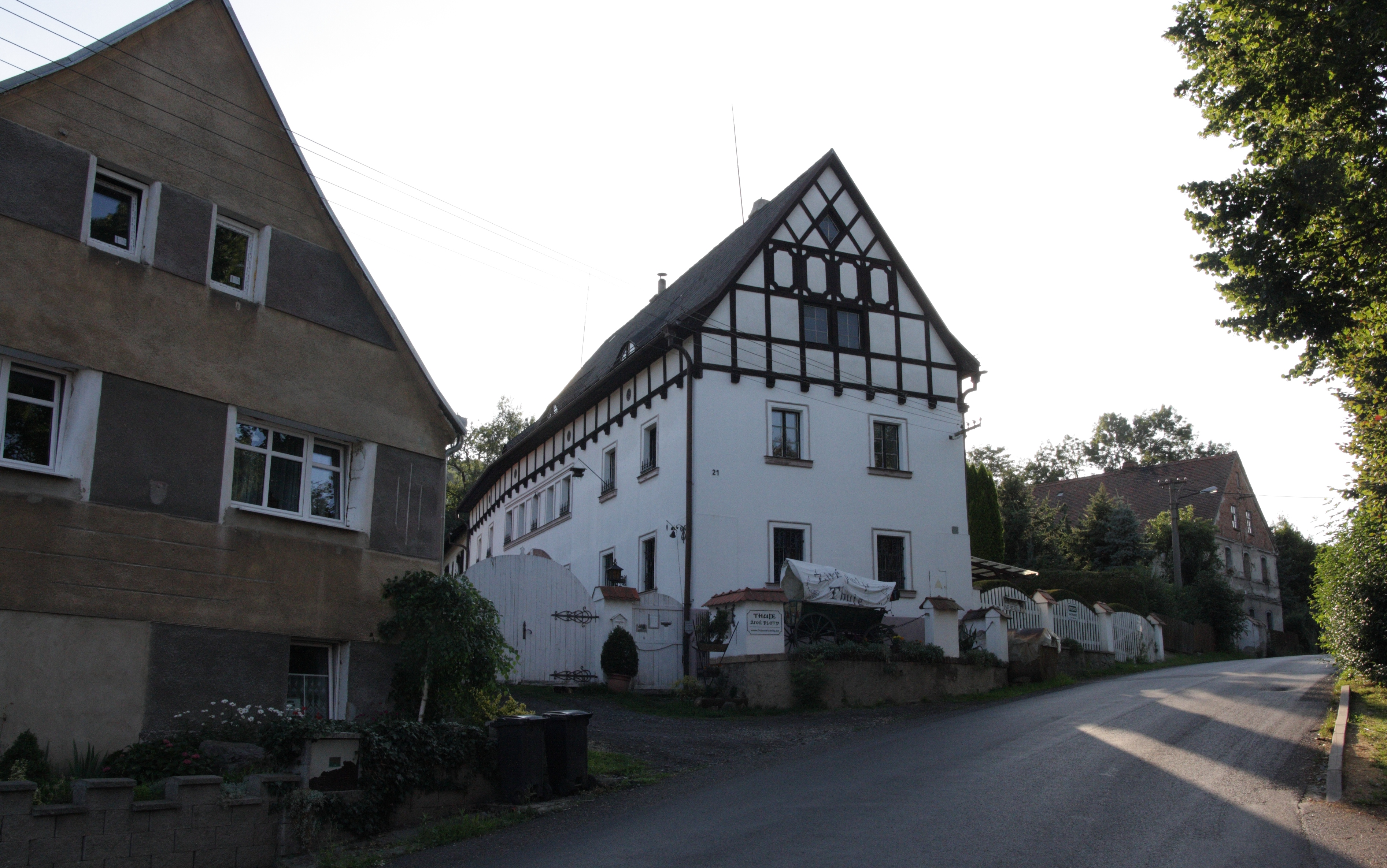 Kojetice (Ústí nad Labem) - domy na návsi